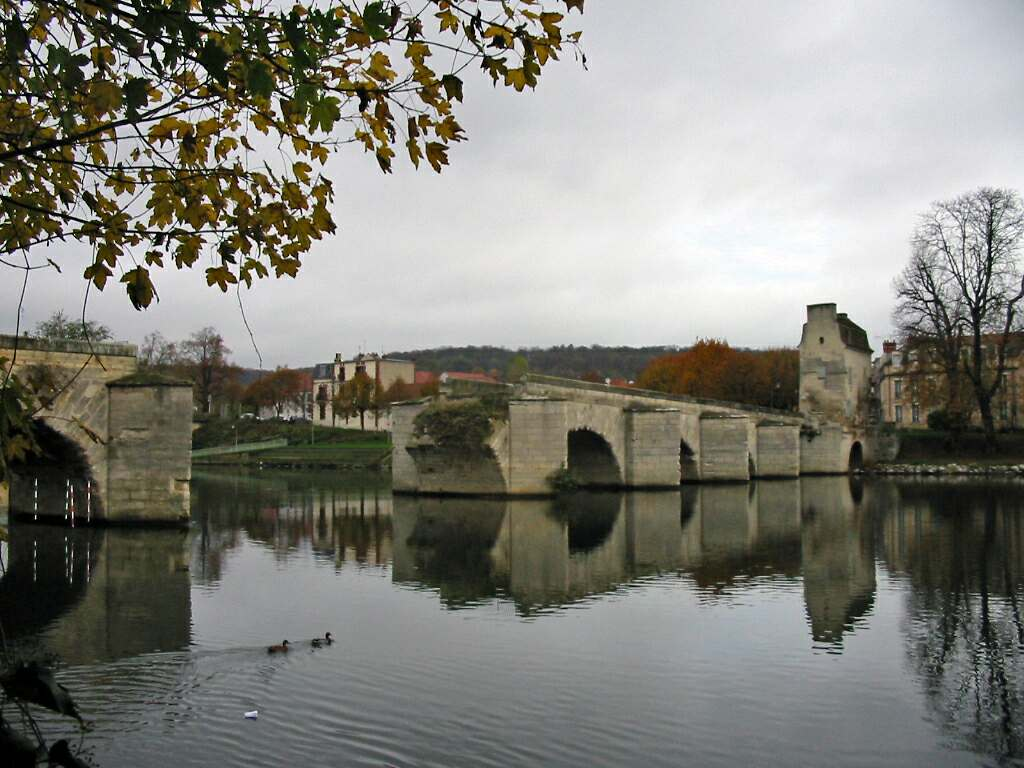 Vieux pont de Limay (Yvelines) à Mantes, exécutant Eustache de Saint-Far architecte et urbaniste français; Photo JH Mora, août 2005